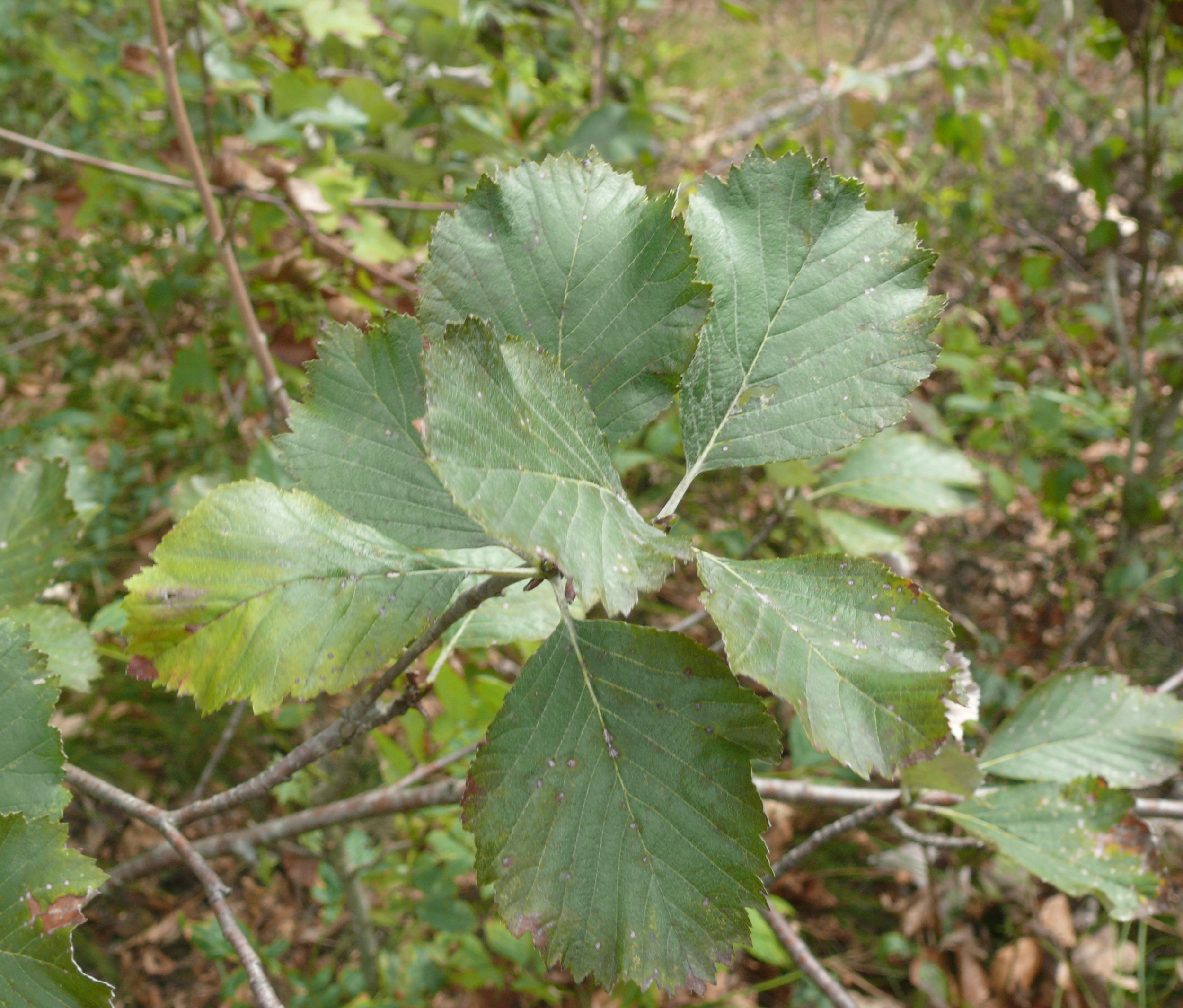 Sorbus danubialis, Altmühltal